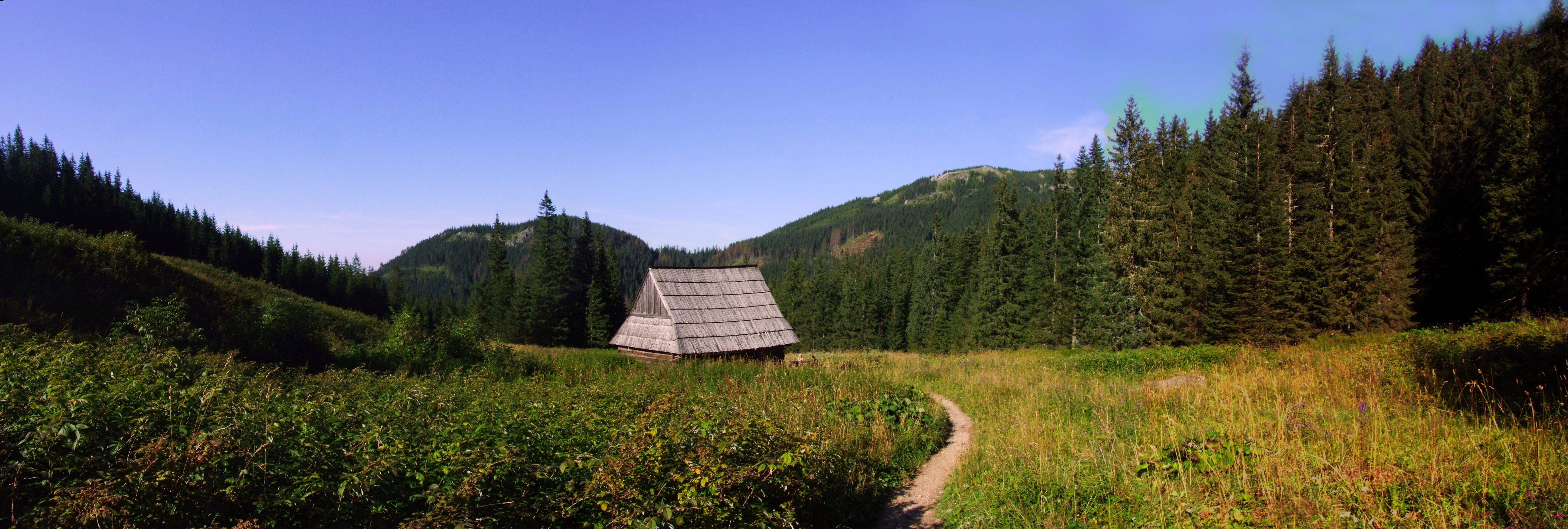 Polana Olczysko. Widok na Mały Kopieniec i Wielki Kopieniec